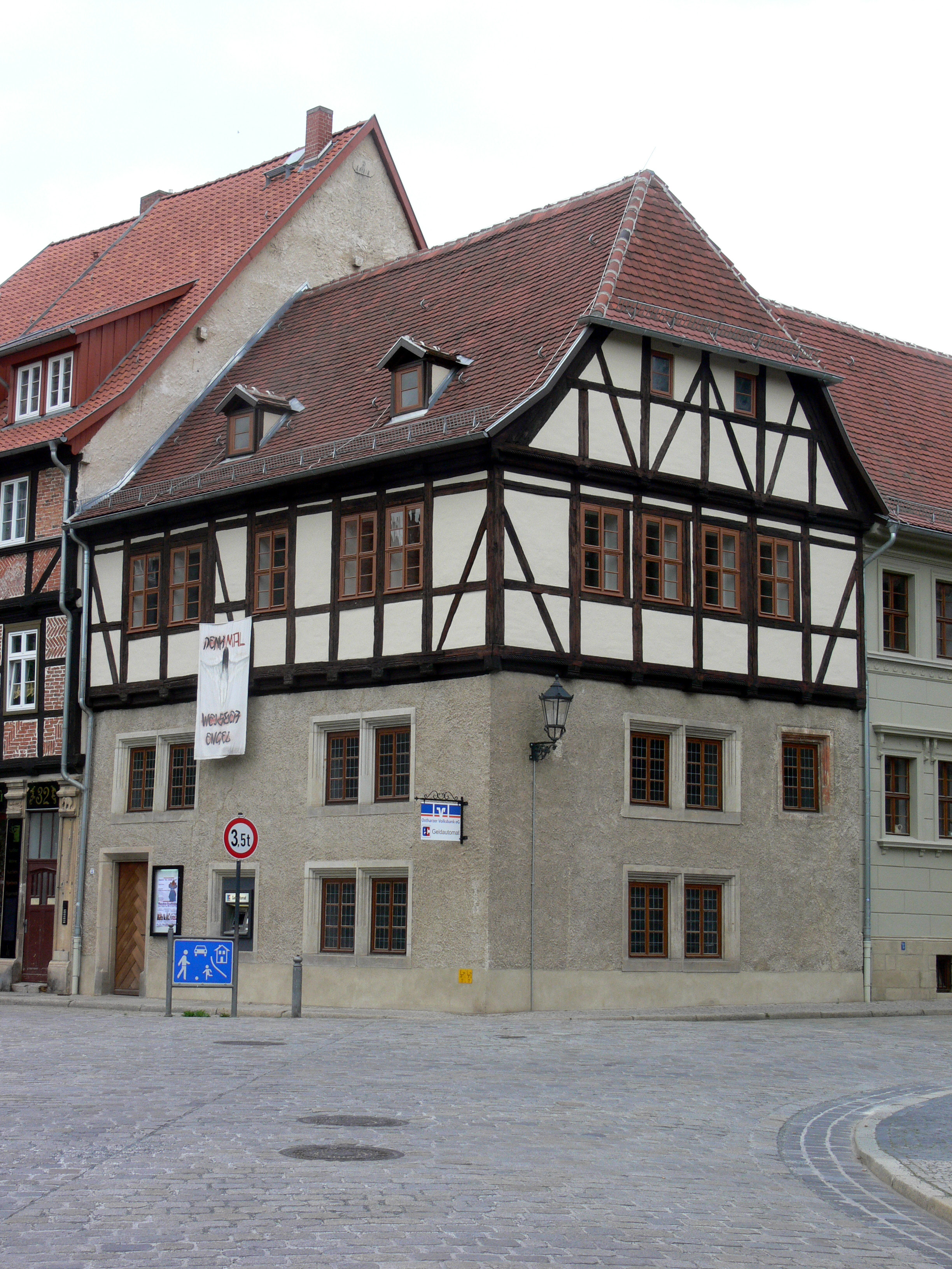 Fachwerkhaus Lange Gasse 33, "Weißer Engel".